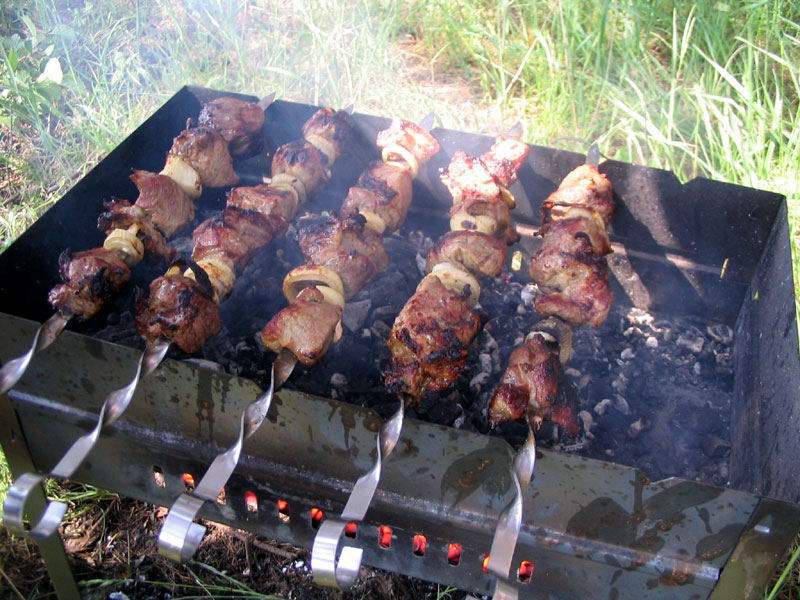 Шашлык.